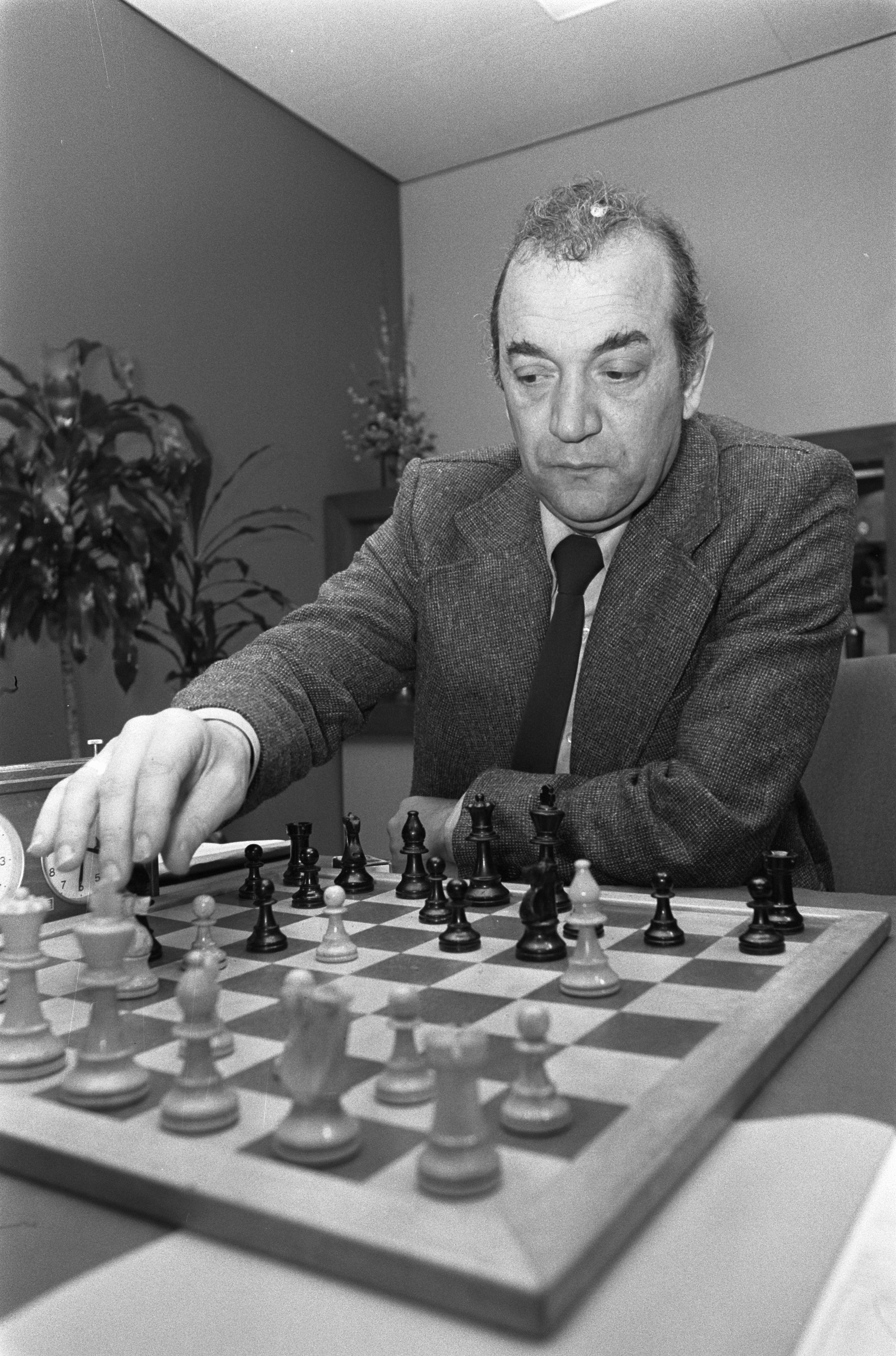 Schaaktweekamp Timman tegen Kortsjnoj.